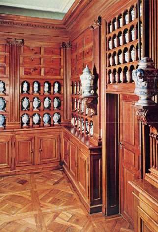 Apothicairerie.